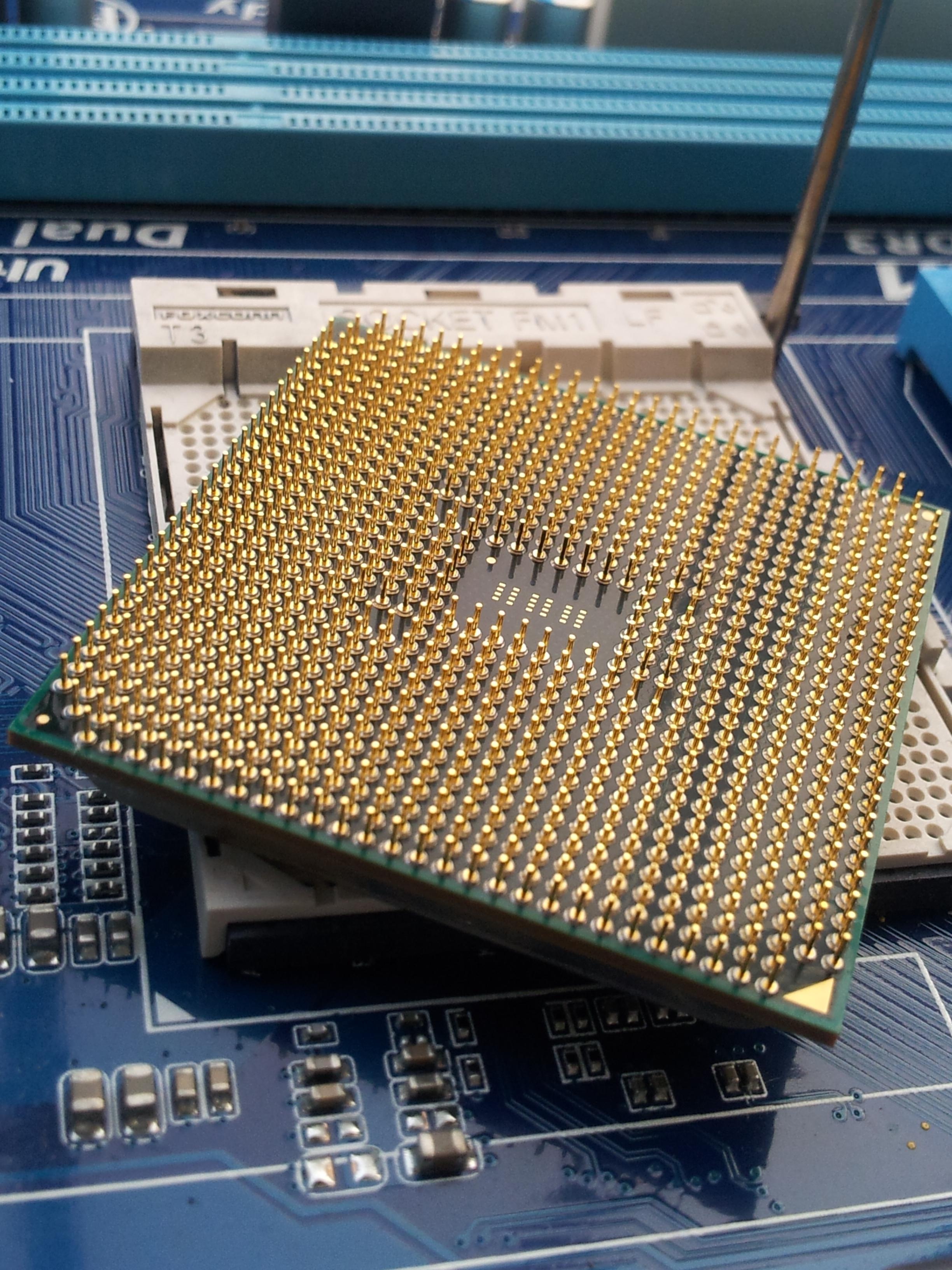 AMD AthlonII X4 641